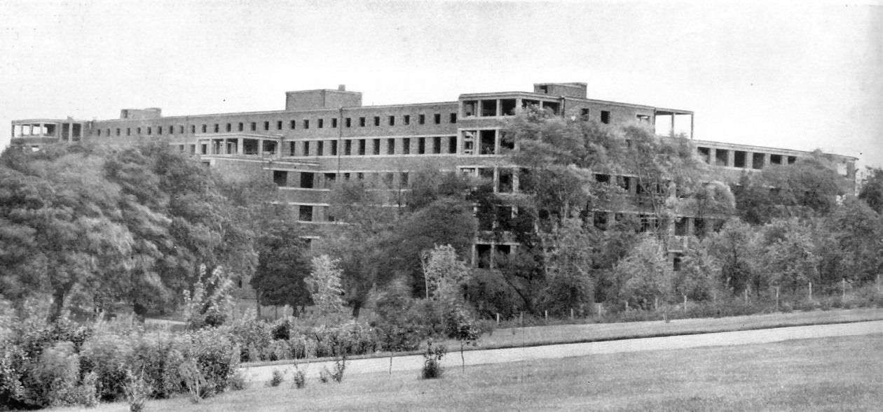 Szczecin,1930 r. Szpital kobiecy - budowa, Landes Frauenklinik